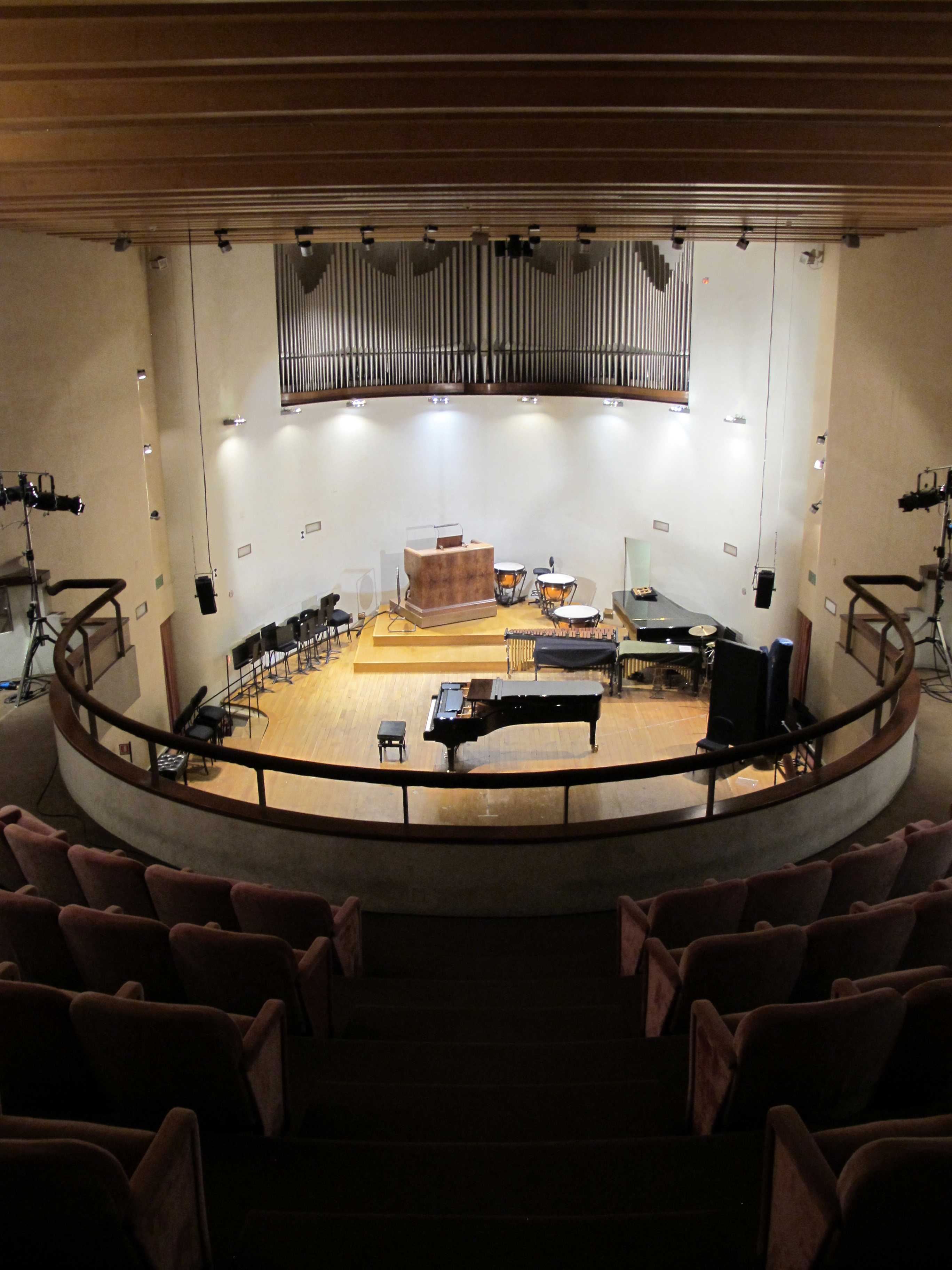 Firenze